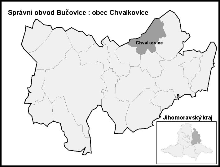 Hranice Chvalkovice (Vyškov-(Bučovice)- Czech republic)